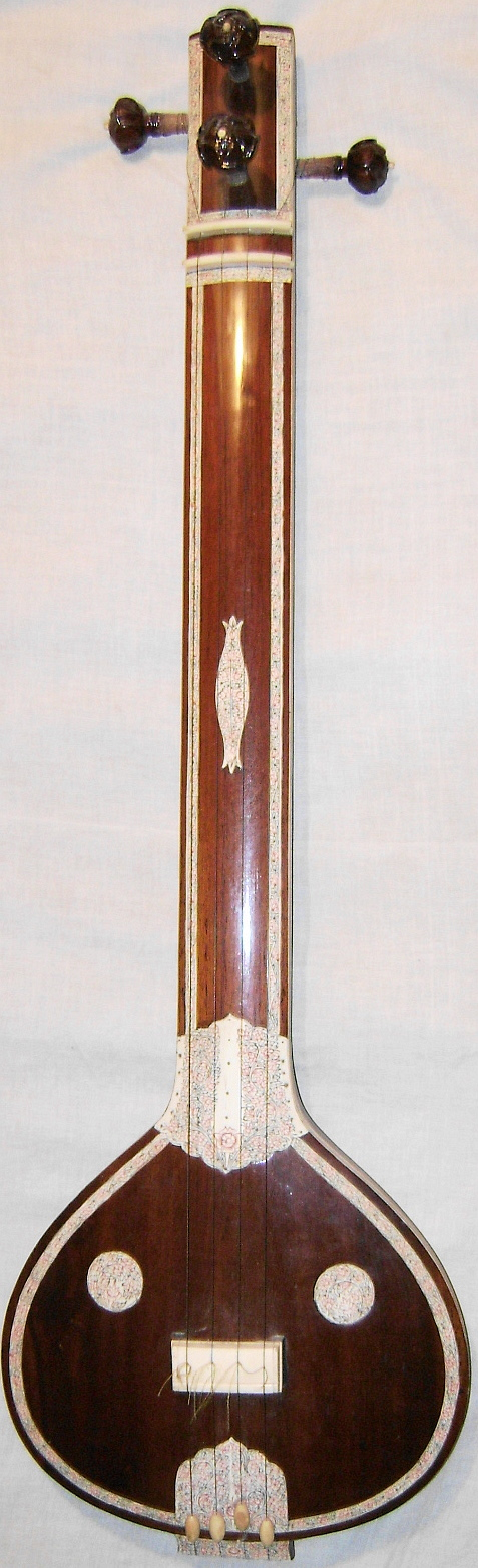 Tampuri (indian luth) or small tampura